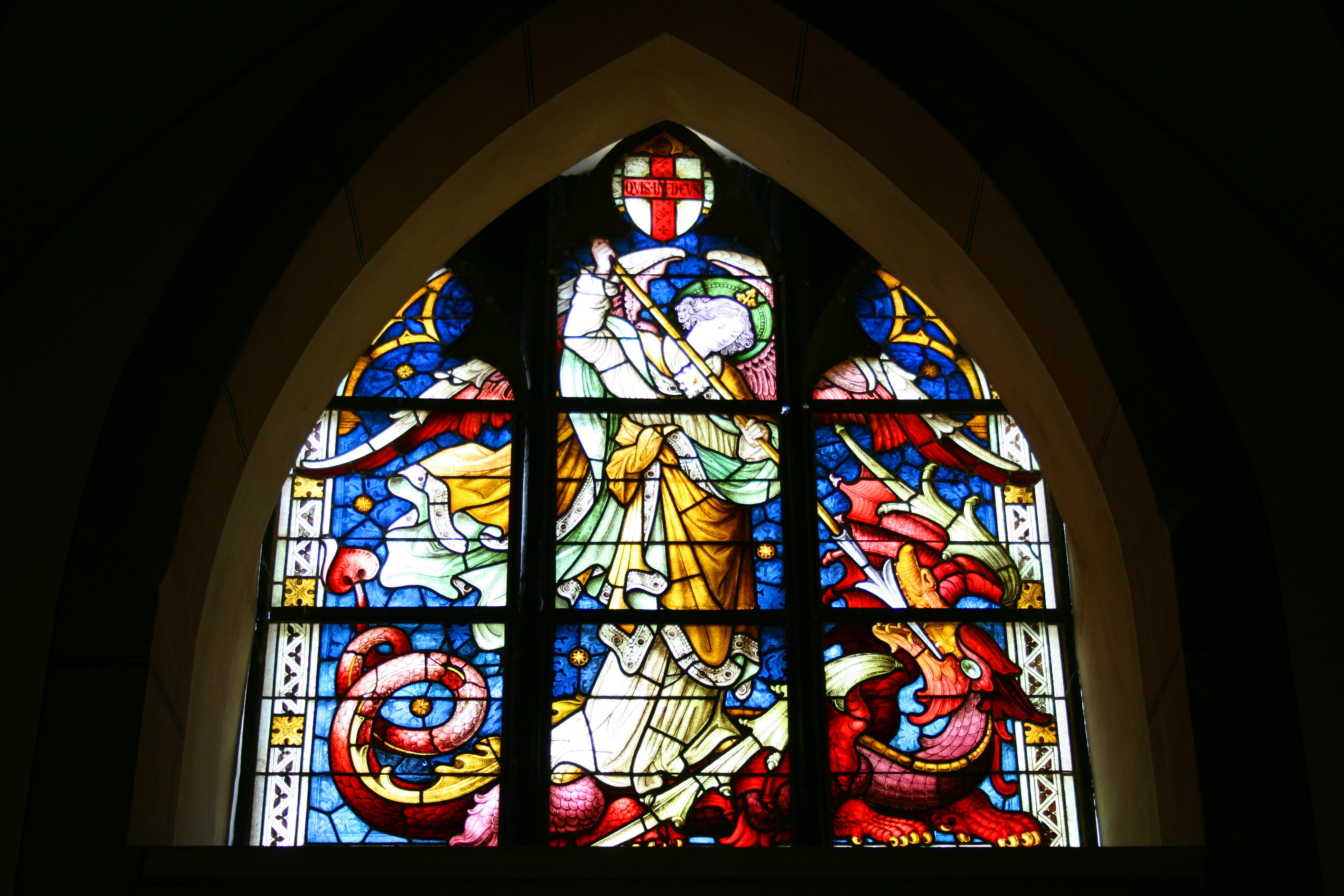 Sankt Peter und Paul in Kalkar-Grieth